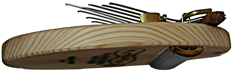 アースサウンド・カリンバという楽器の横 愛知万博の日本館のサイト「サイバー日本館」内の「どこでもニッポンカン」というコーナーで頂いたもの。 裏側の丸い板が共鳴板の役割を果たし、両側に開いた穴を中指で開閉するとビブラートがかかるようになっている。この丸い板は表側の金属類を留めている針金の足を隠すように取り付けられており、安全性にも配慮した構造になっている。 １３２人目による撮影